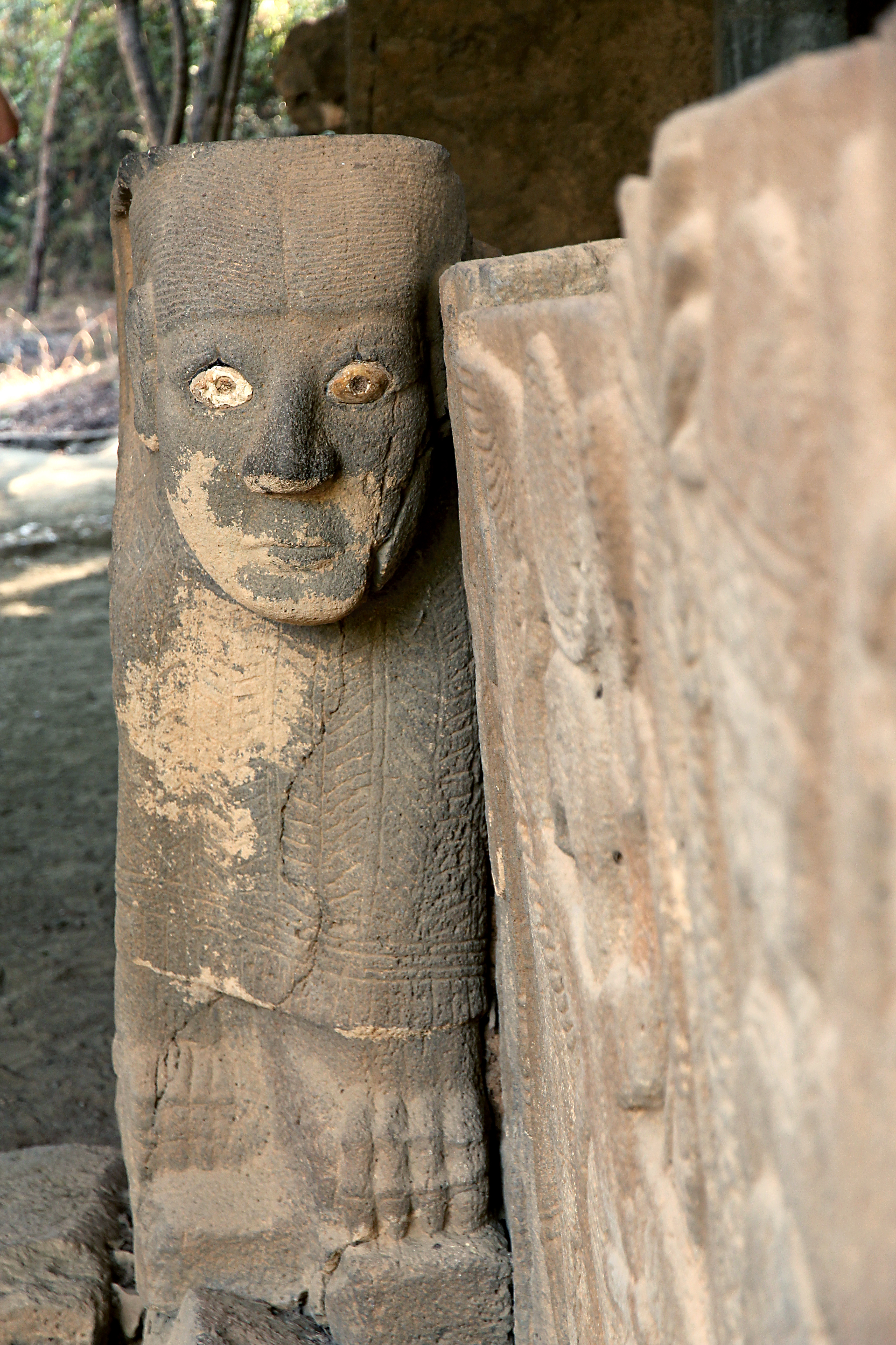 Karatepe (Asatiwataya), neo-hethitischer Fundort bei Osmaniye, Südtürkei, Nordtor Portalsphinx NVr 13